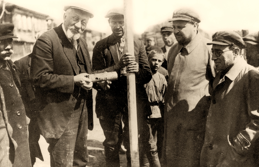 Профессор П.И. Преображенский с керном скважины на открытии месторождения 2-го Баку.